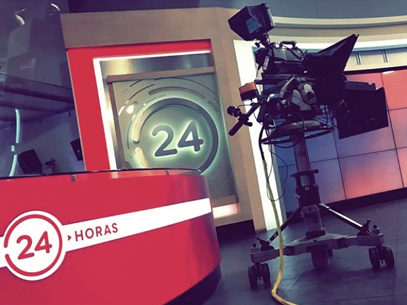 Teleprompter usado por Televisión Nacional de Chile durante la cobertura de la elección municipal del 23 de octubre de 2016.